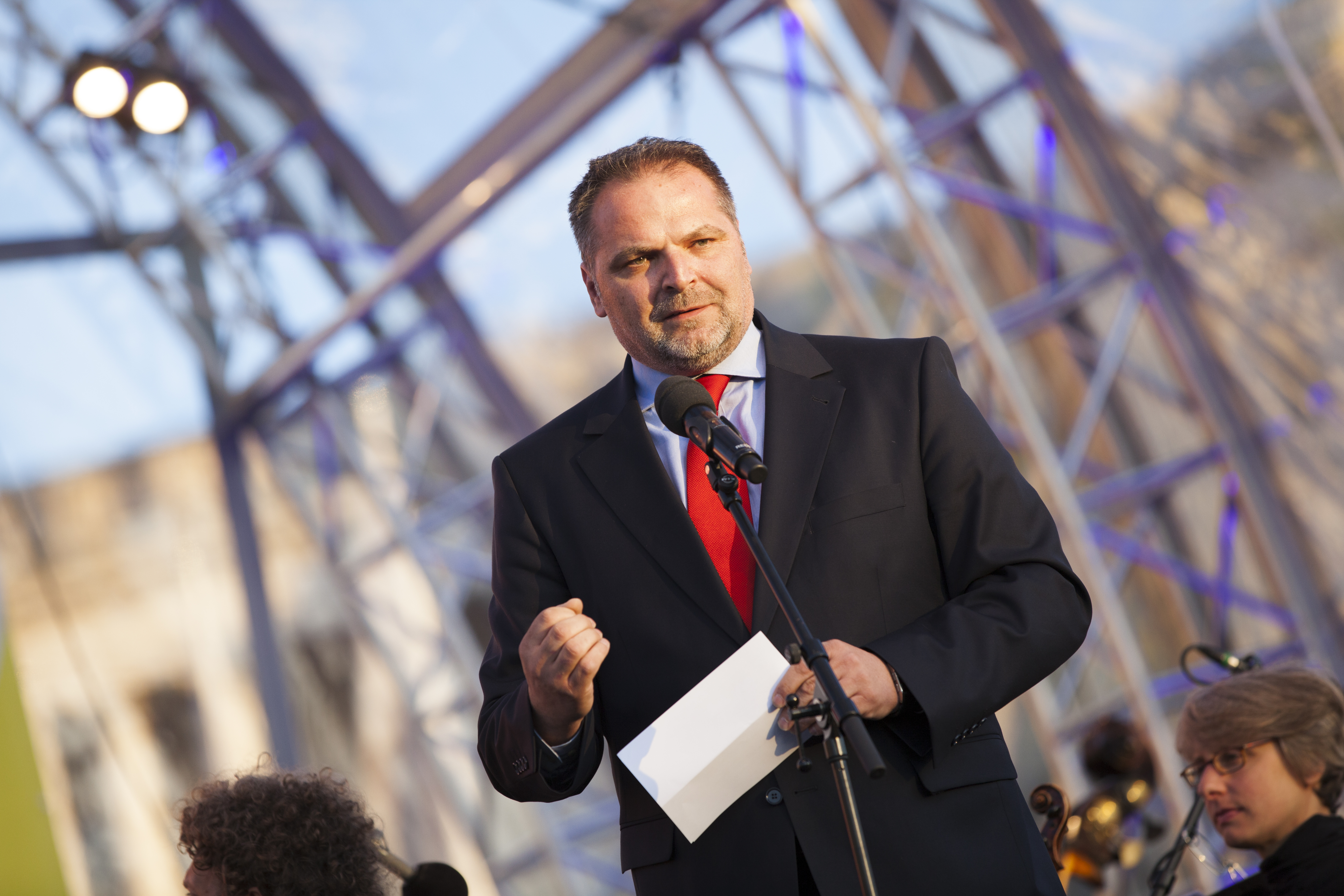 Willi Mernyi, Vorsitzender Mauthausen Komitee, am Fest der Freude 2014 am Heldenplatz in Wien